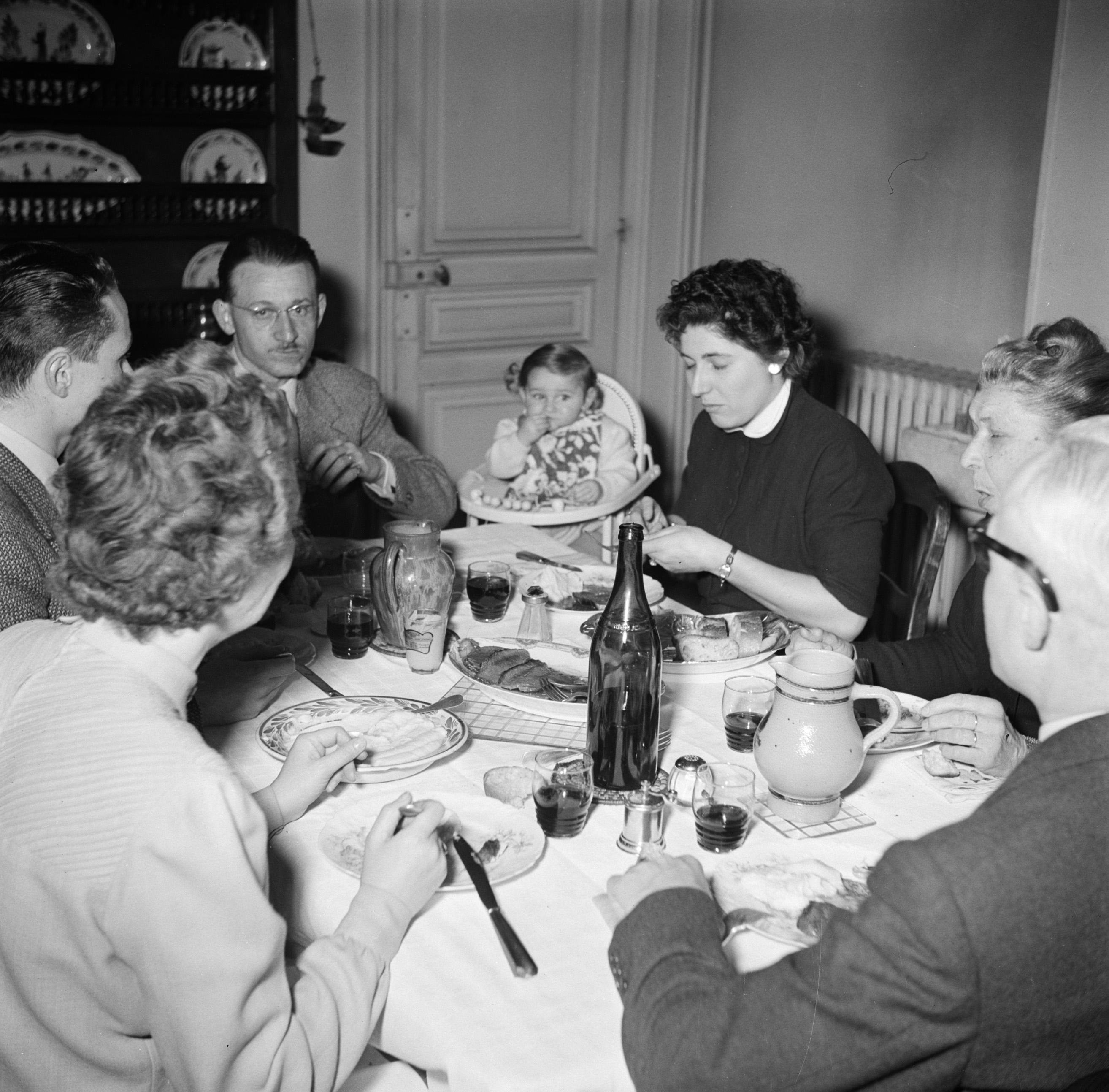 Collectie / Archief : Fotocollectie Van de Poll Reportage / Serie : Bewoners van een appartementengebouw in Parijs Beschrijving : Familie met gasten aan de maaltijd Datum : 1950 Locatie : Frankrijk, Parijs Trefwoorden : families, flessen, gezinnen, maaltijden, wijn Fotograaf : Poll, Willem van de Auteursrechthebbende : Nationaal Archief Materiaalsoort : Negatief (zwart/wit) Nummer archiefinventaris : bekijk toegang 2.24.14.02 Bestanddeelnummer : 252-9362